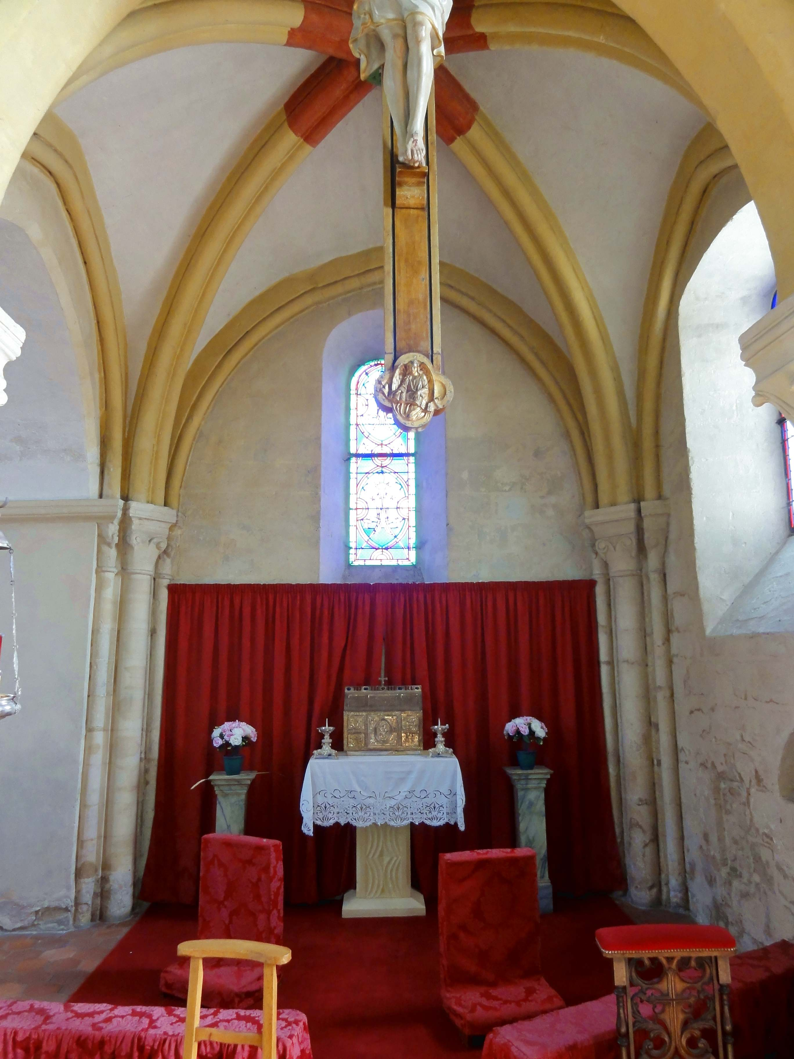 Intérieur de l'église - voir titre.